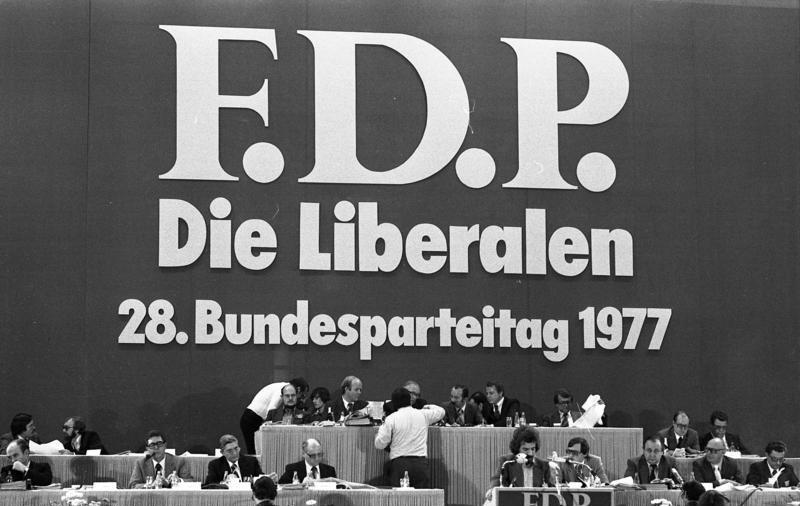 28. Ordentlicher Bundesparteitag der FDP in der Kieler Ostseehalle 6.-8.11.1977